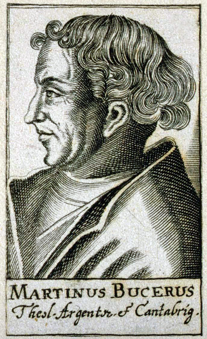 Martinus Bucerus théol. Argentor. et Cantabrig., gravure 1680.